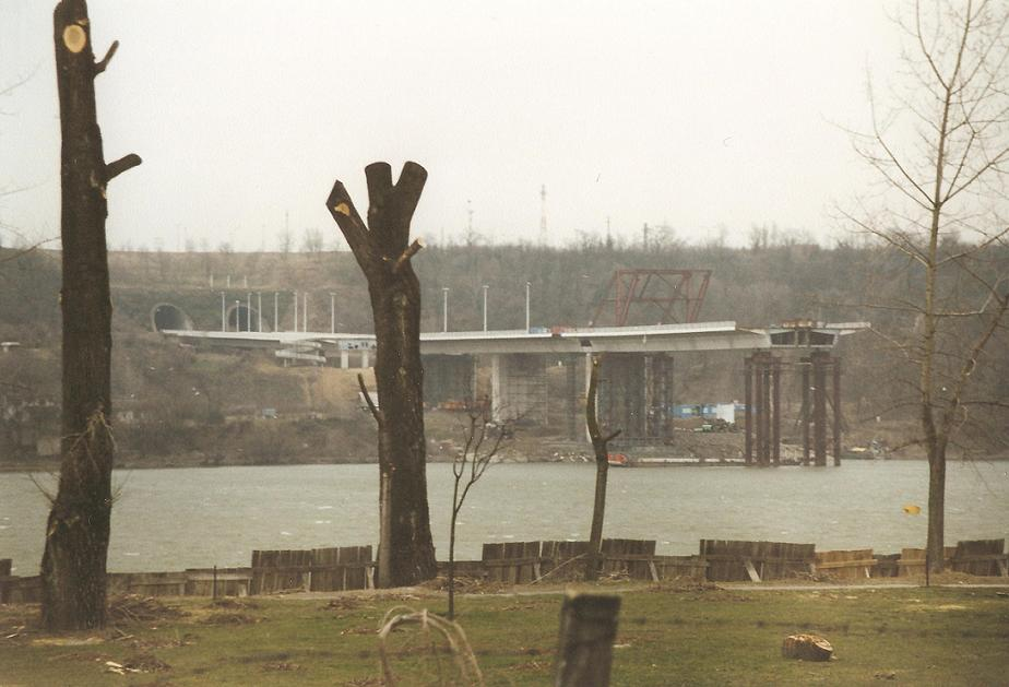 danube bridge in novi sad, vojvodina, under construction